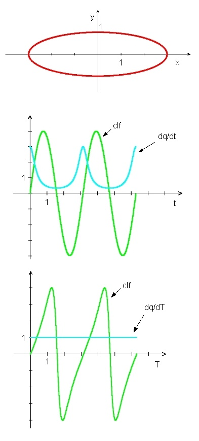 Dessin d'une ellipse et de la représentation de sa forme